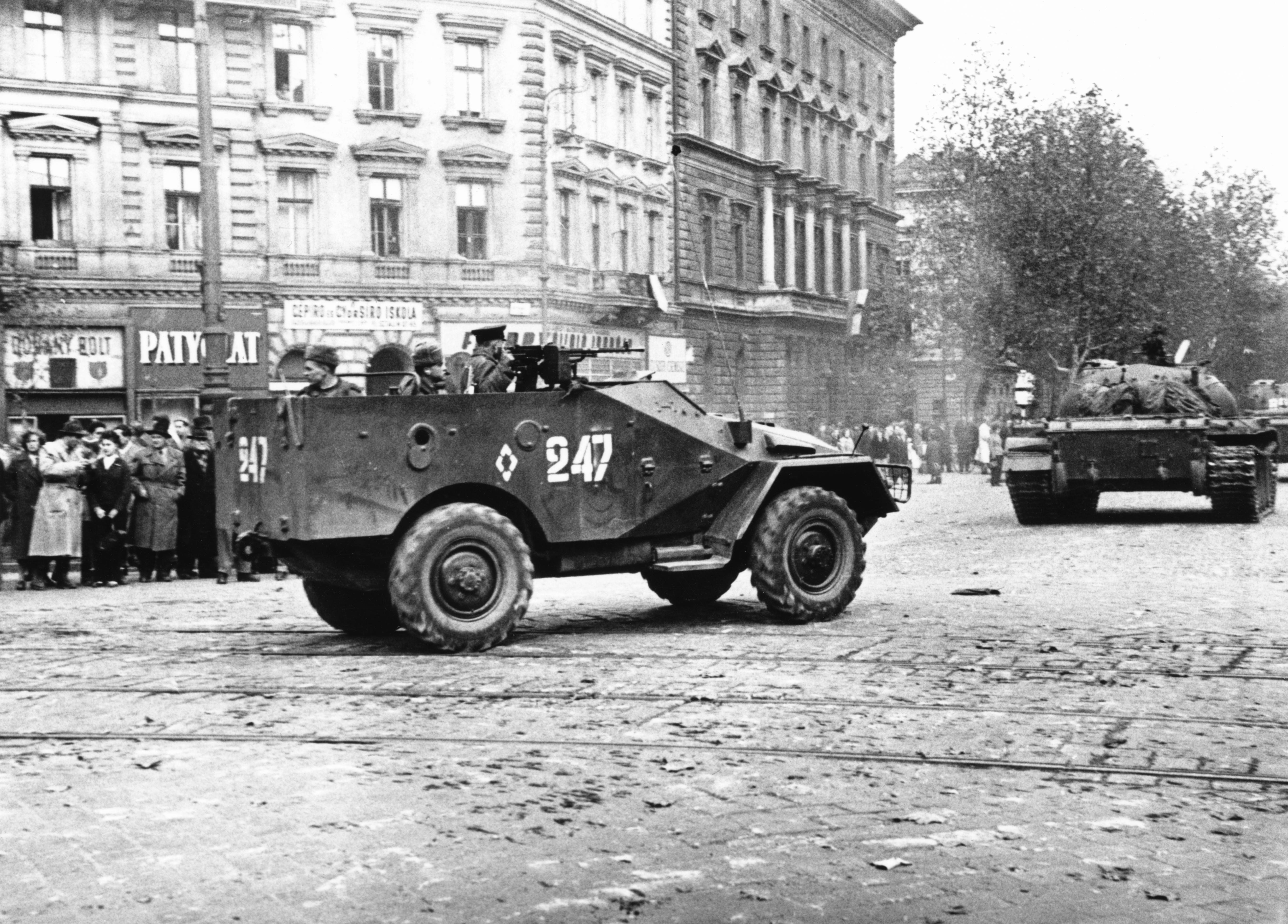 Magyarország Budapest VI. Oktogon (November 7. tér). A szovjet csapatok ideiglenes kivonulása 1956. október 31-én.